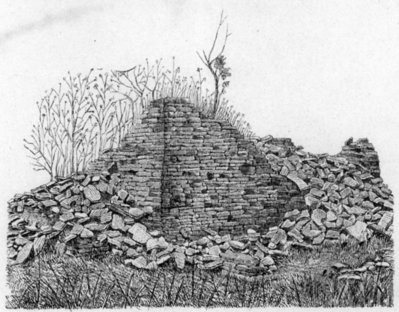 Вид развалин часовни в Зеленчук. ущелии. Вид развалин последней (пятой) часовни (с входной передней стороны).